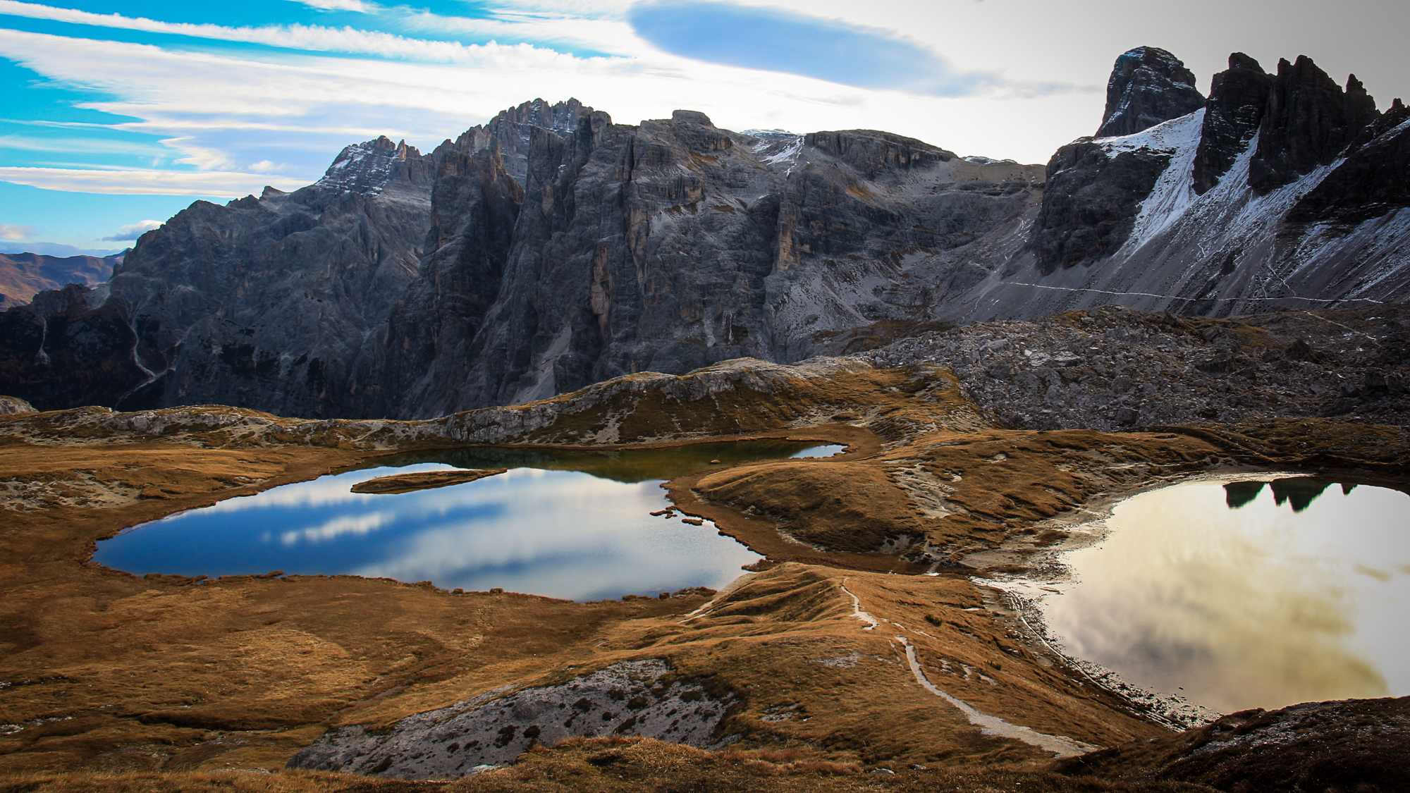 Parco naturale Tre Cime - laghi dei Piani